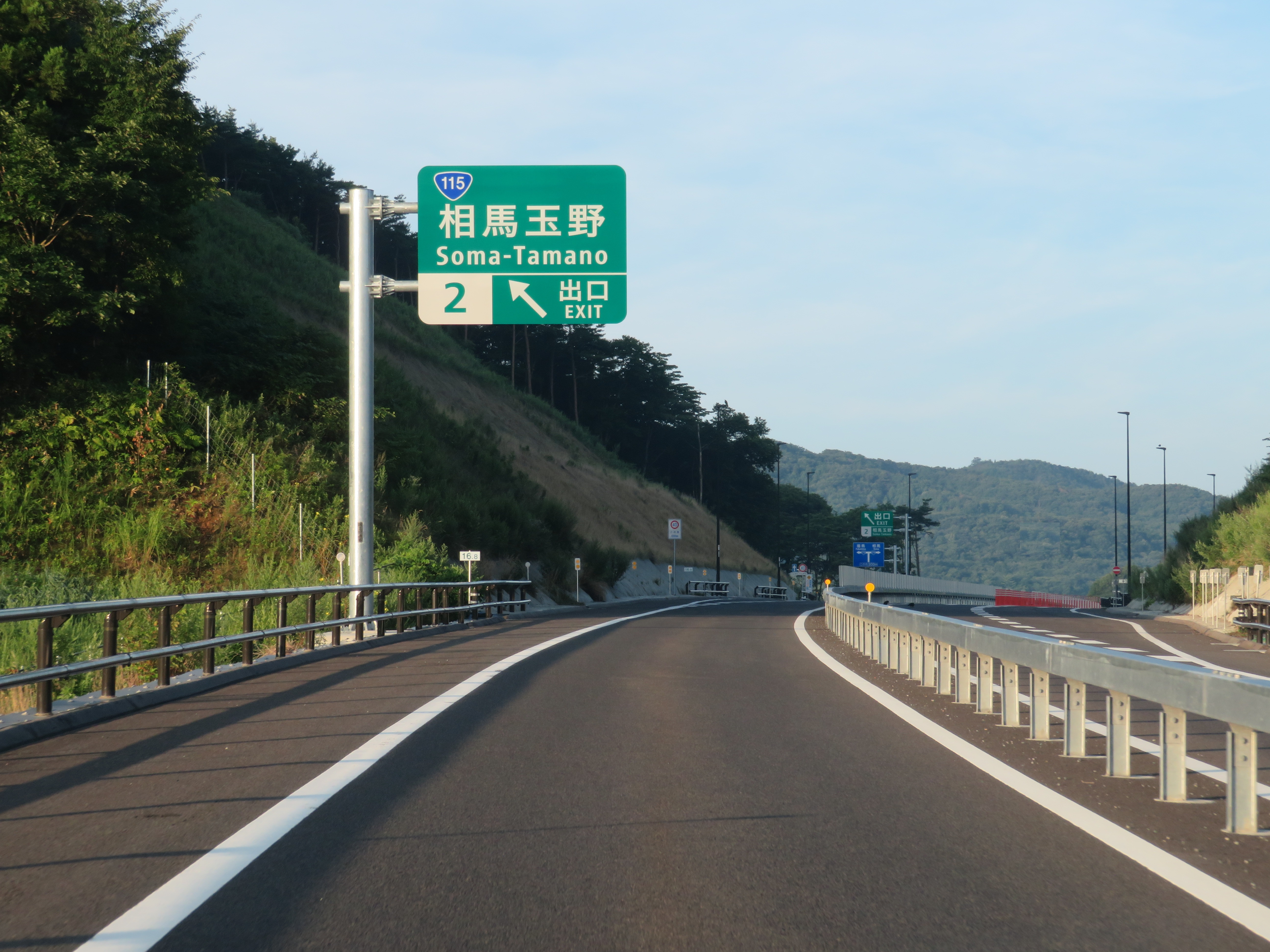 東北中央自動車道（相馬福島道路）相馬玉野ＩＣ出口付近 Canon PowerShot SX720 HS